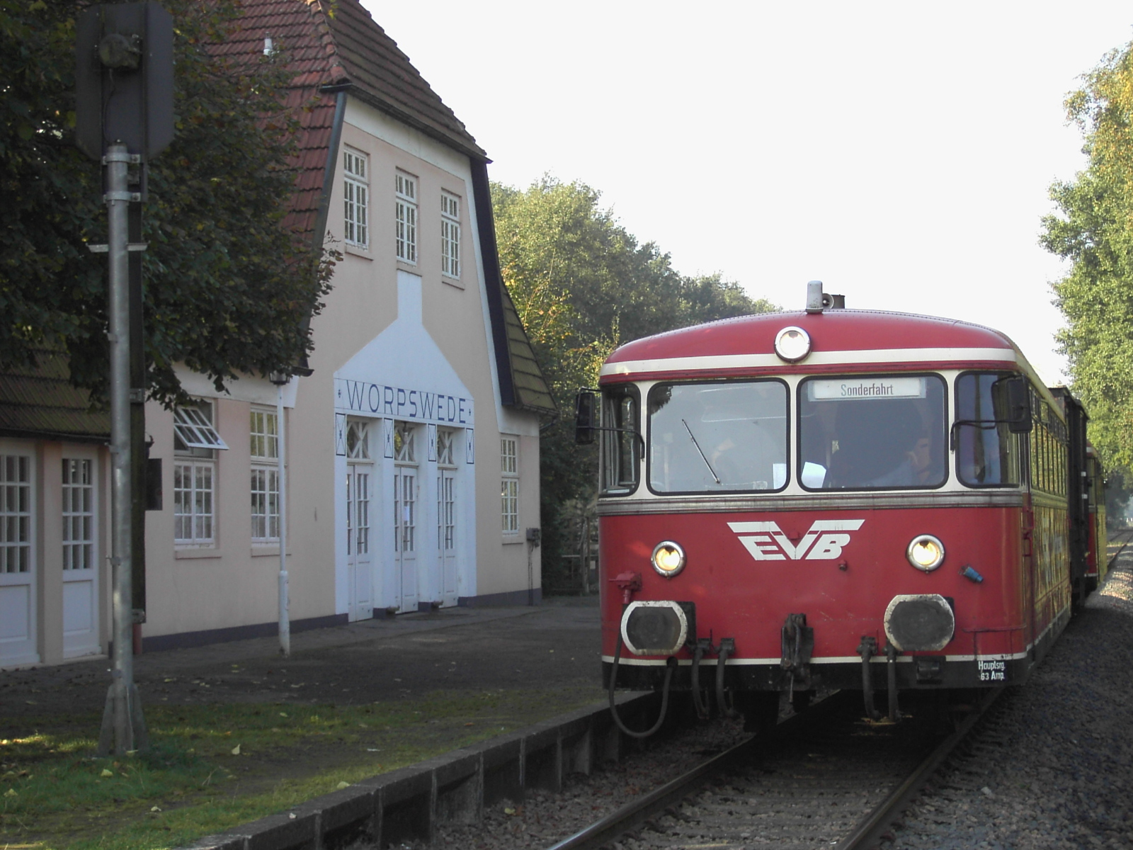 Triebwagen der Baureihe 798 der Eisenbahnen und Verkehrsbetriebe Elbe-Weser GmbH im Bahnhof Worpswede.